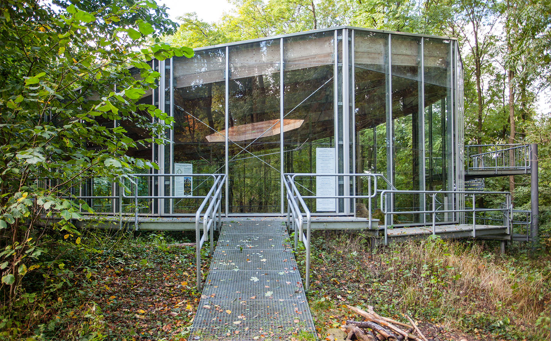 Schutzbau über den Fundamentresten der Kreuzkirche (Wittekindsberg), Stadtgebiet Minden nahe Porta Westfalica